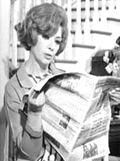 Myriam de Urquijo actriz